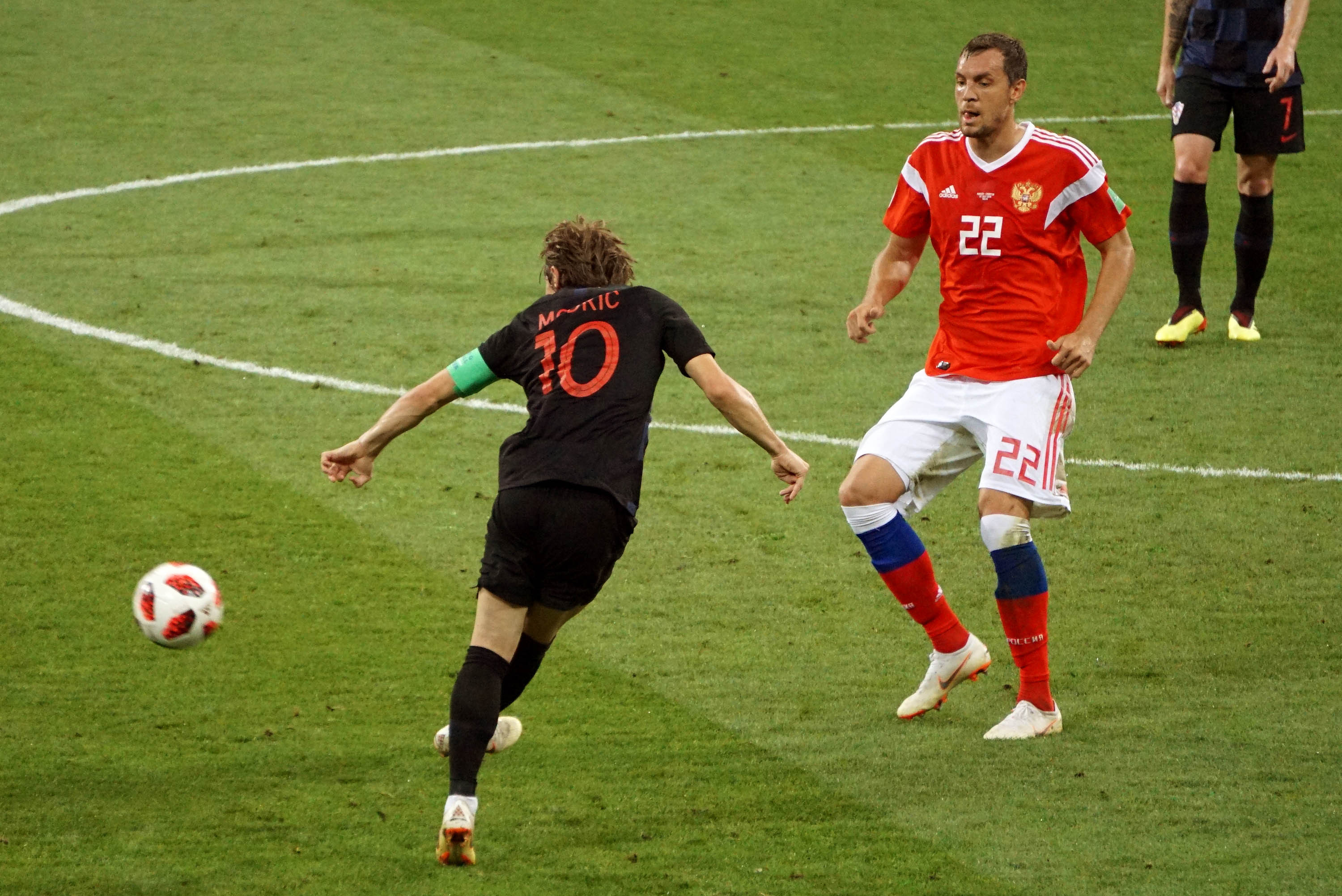 Модрич против Дзюбы. ЧМ по футболу 2018. 7 июля 2018 года сборная Хорватии обыграла сборную России со счётом 2:2 (4:3) по пенальти на ЧМ-2018 на стадионе «Фишт».